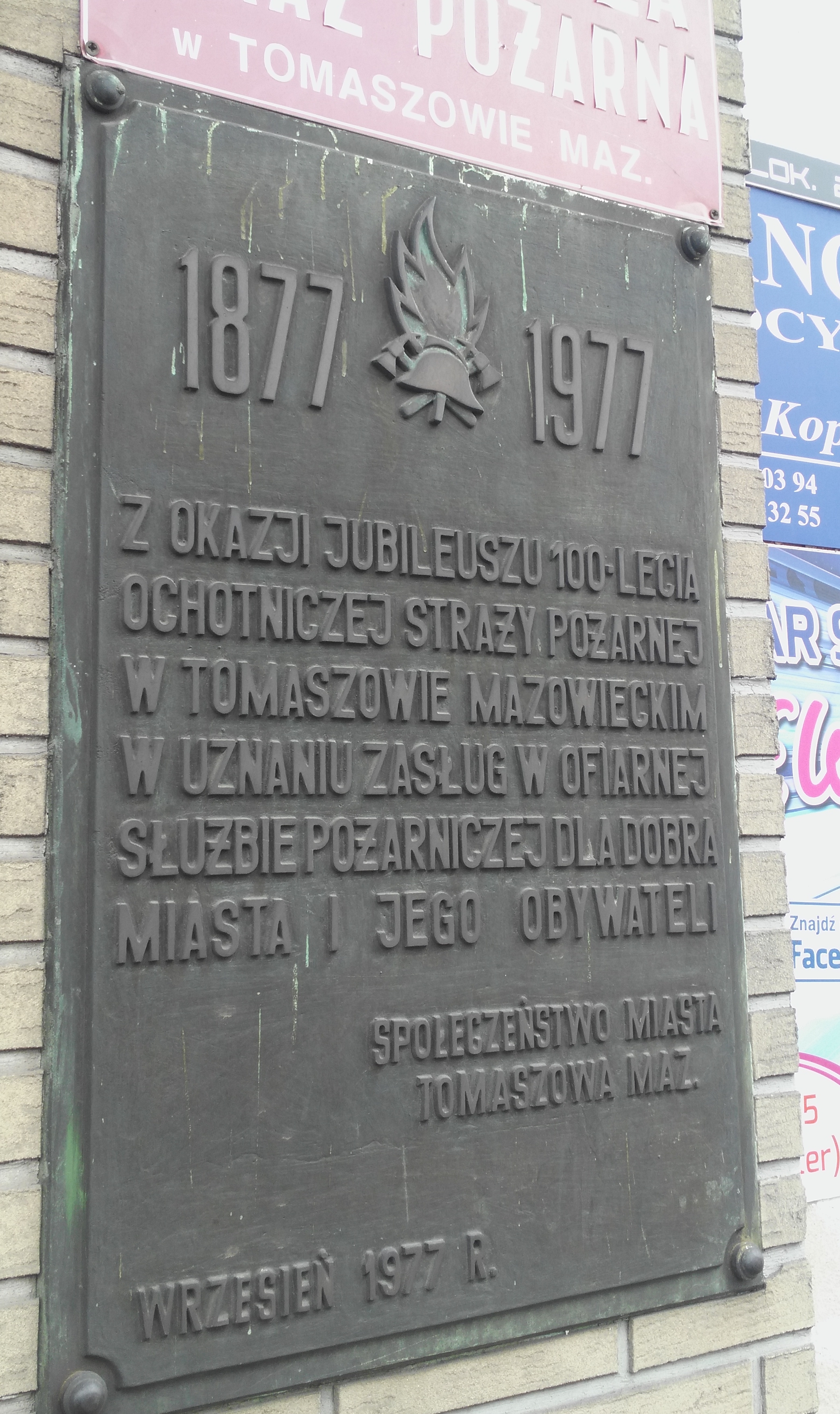 Tablica pamiątkowa na budynku dawnej Państwowej Straży Pożarnej, przy ulicy P.O.W w Tomaszowie. Obecnie Ochotnicza Straż Pożarna